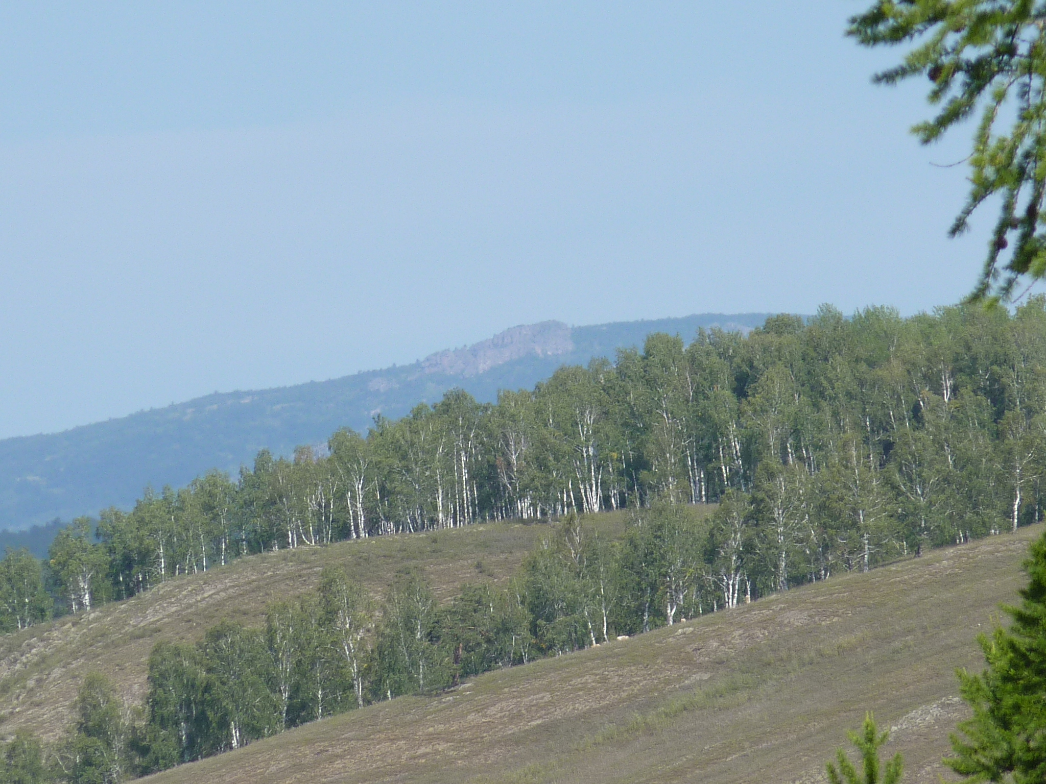 Pink mountain Masim (Розовые скалы Масима)